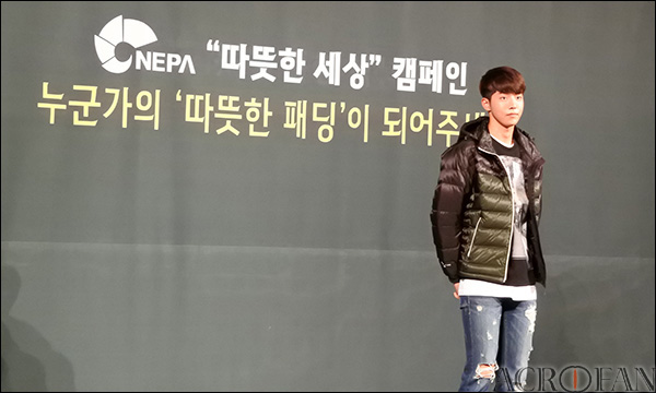 네파 따뜻한 세상 캠페인 론칭 발표회